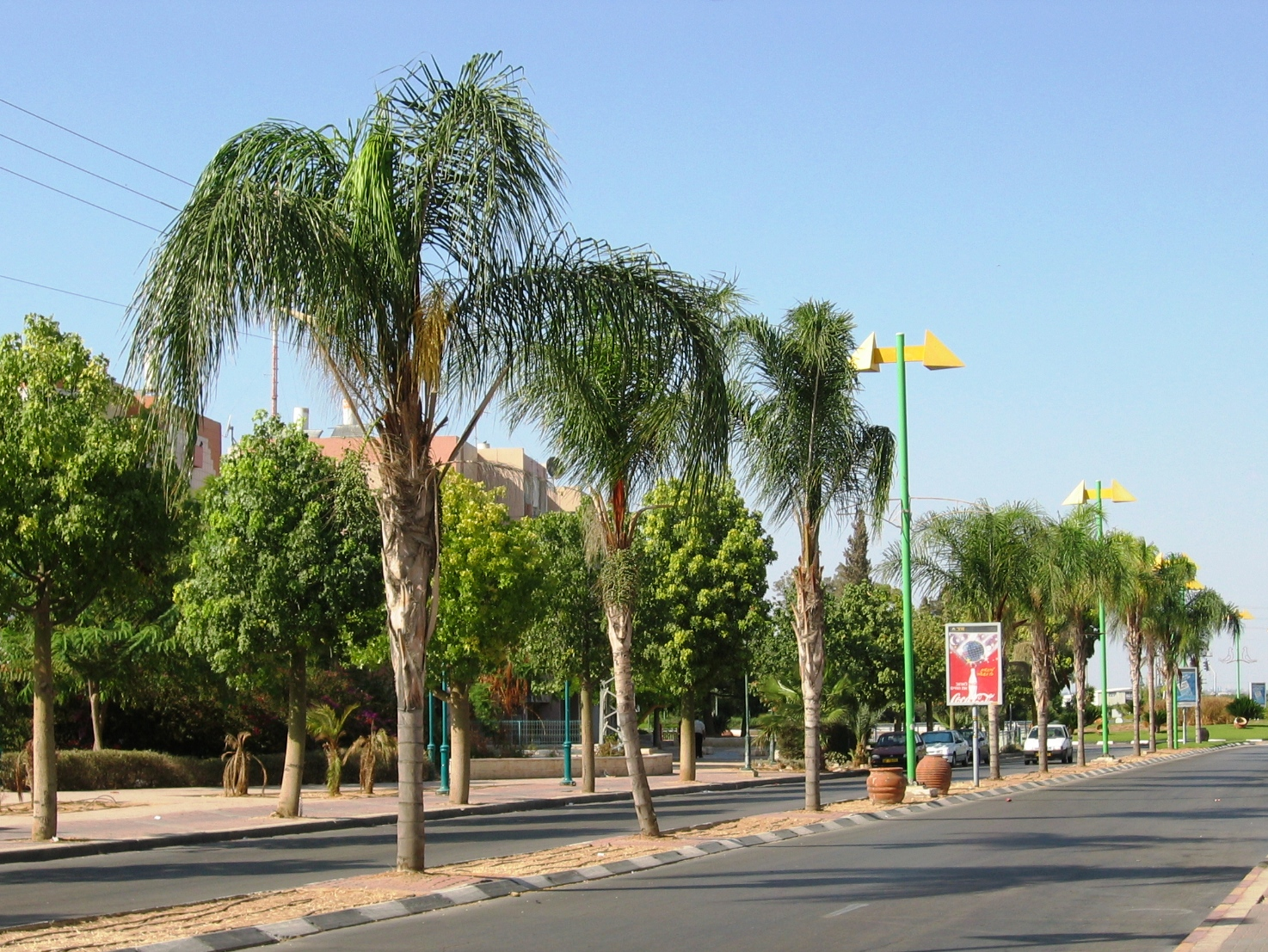 שדרות הרצל - הכניסה לעיר אופקים